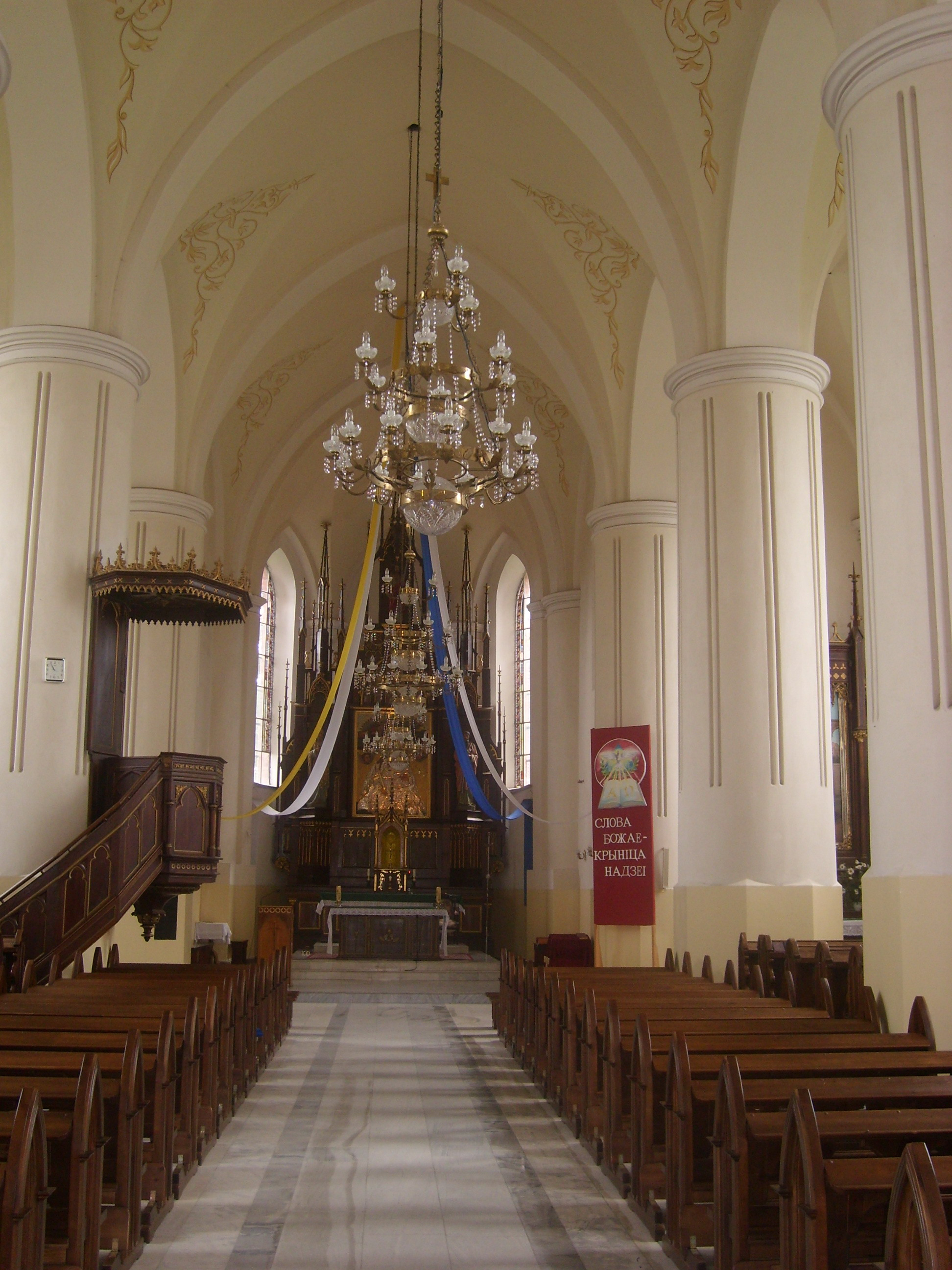 Беларуская (тарашкевіца): Андрэеўскі касьцёл і званіца. в. Нарач This is a photo of Belarusian heritage monument. Reference number: 612Г000443 ( WLM)